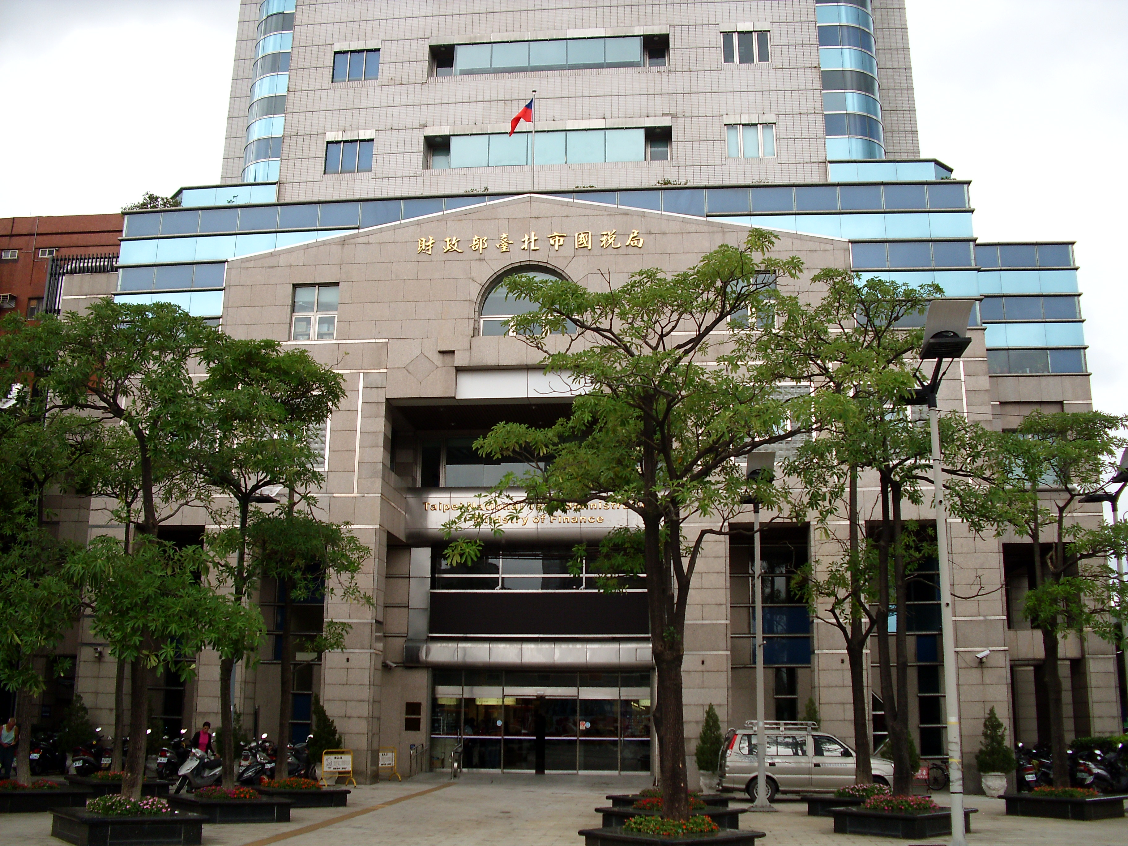 Bân-lâm-gú: 財政部臺北市國稅局大樓頭前。